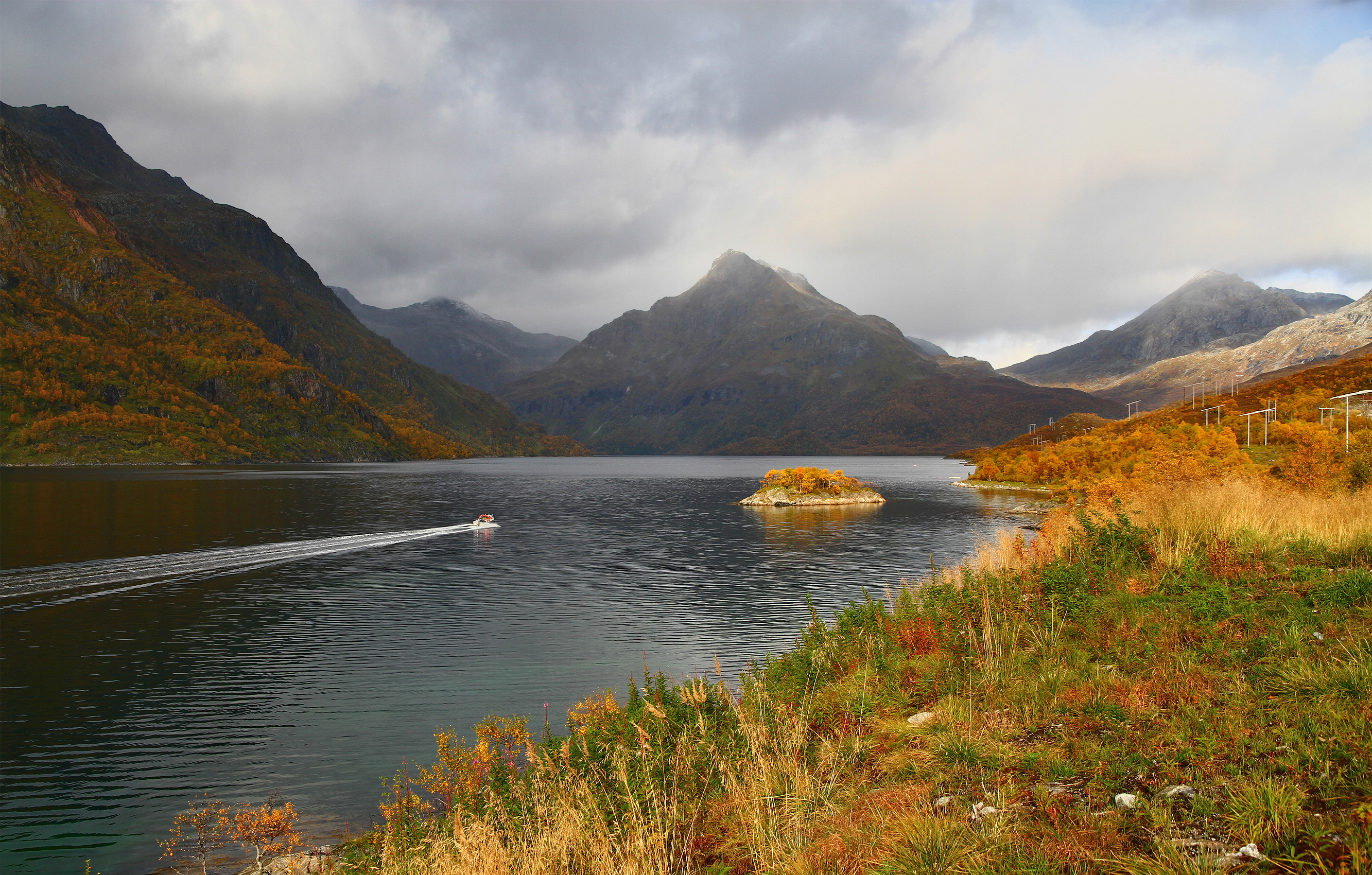 Innerfjorden (Øksfjorden), Hinnøya, Nordland, Norway in 2010 September.